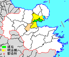 大分県速見郡の範囲